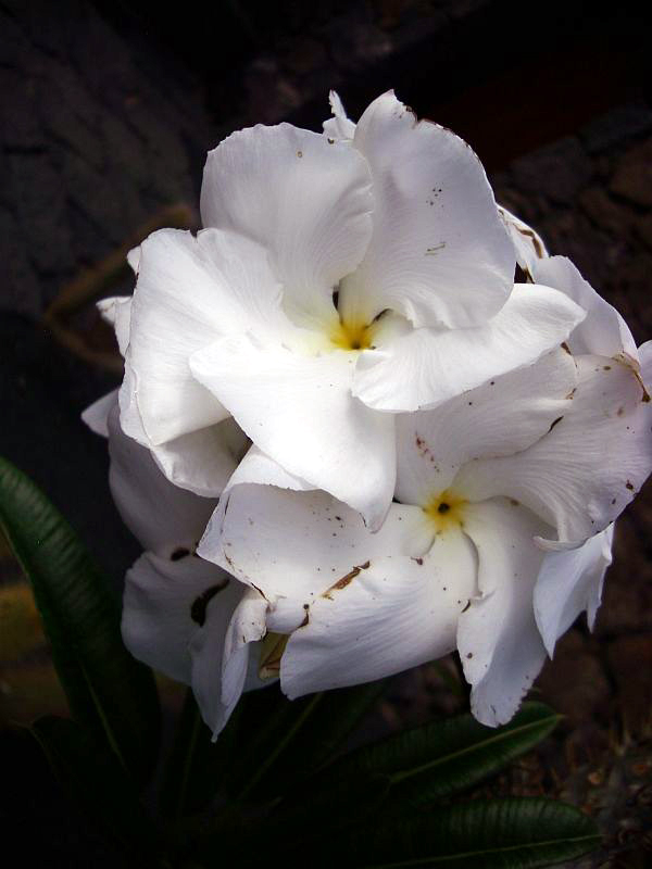 Pachypodium lamerei (Blüte)